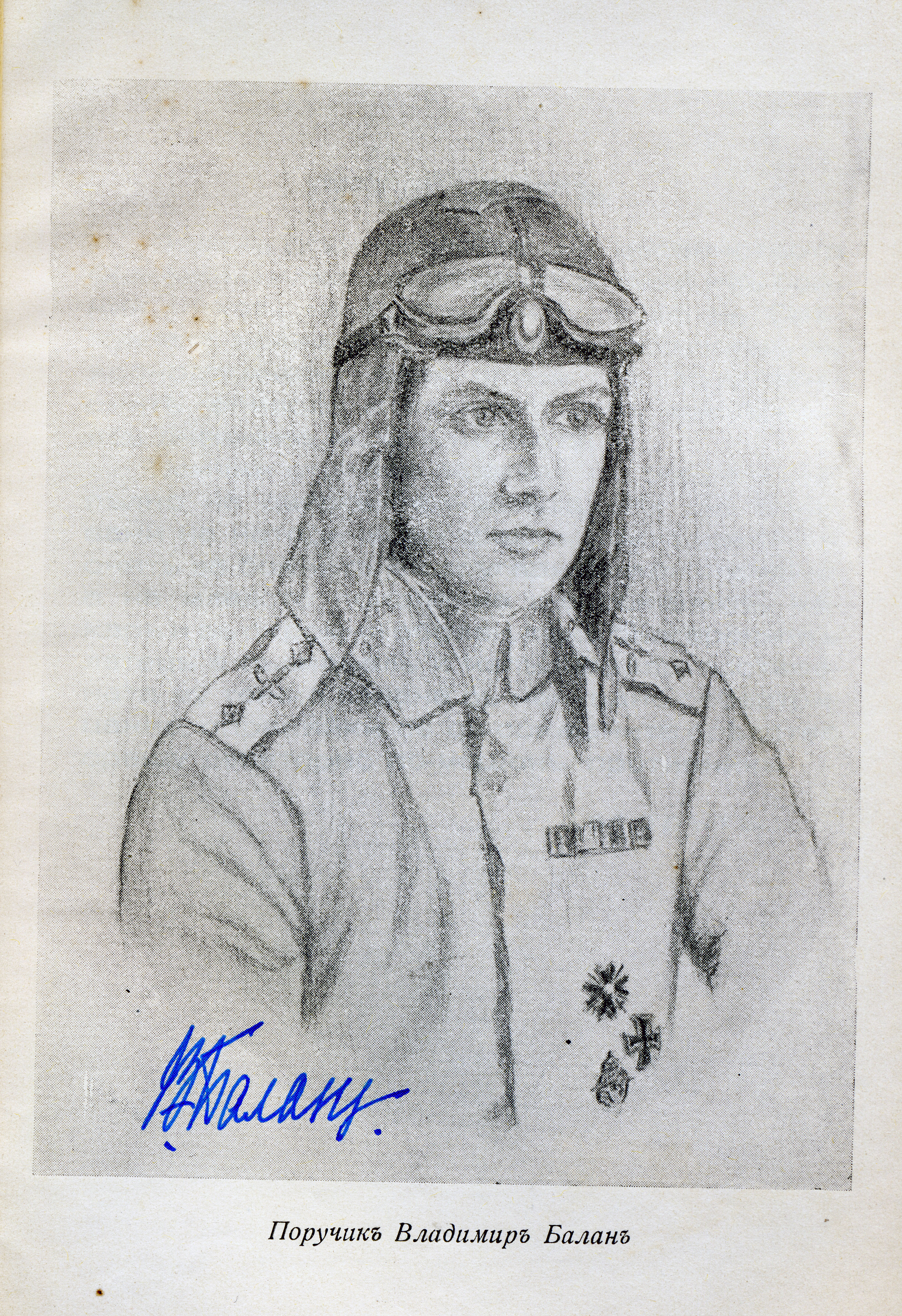 Владимир Балан, военен летец по време на Първа световна война, аероинженер, с принос за развитието на българската авиация и самолетостроене. Рисунката е направена от неизвестен автор през 1917-1918 година.